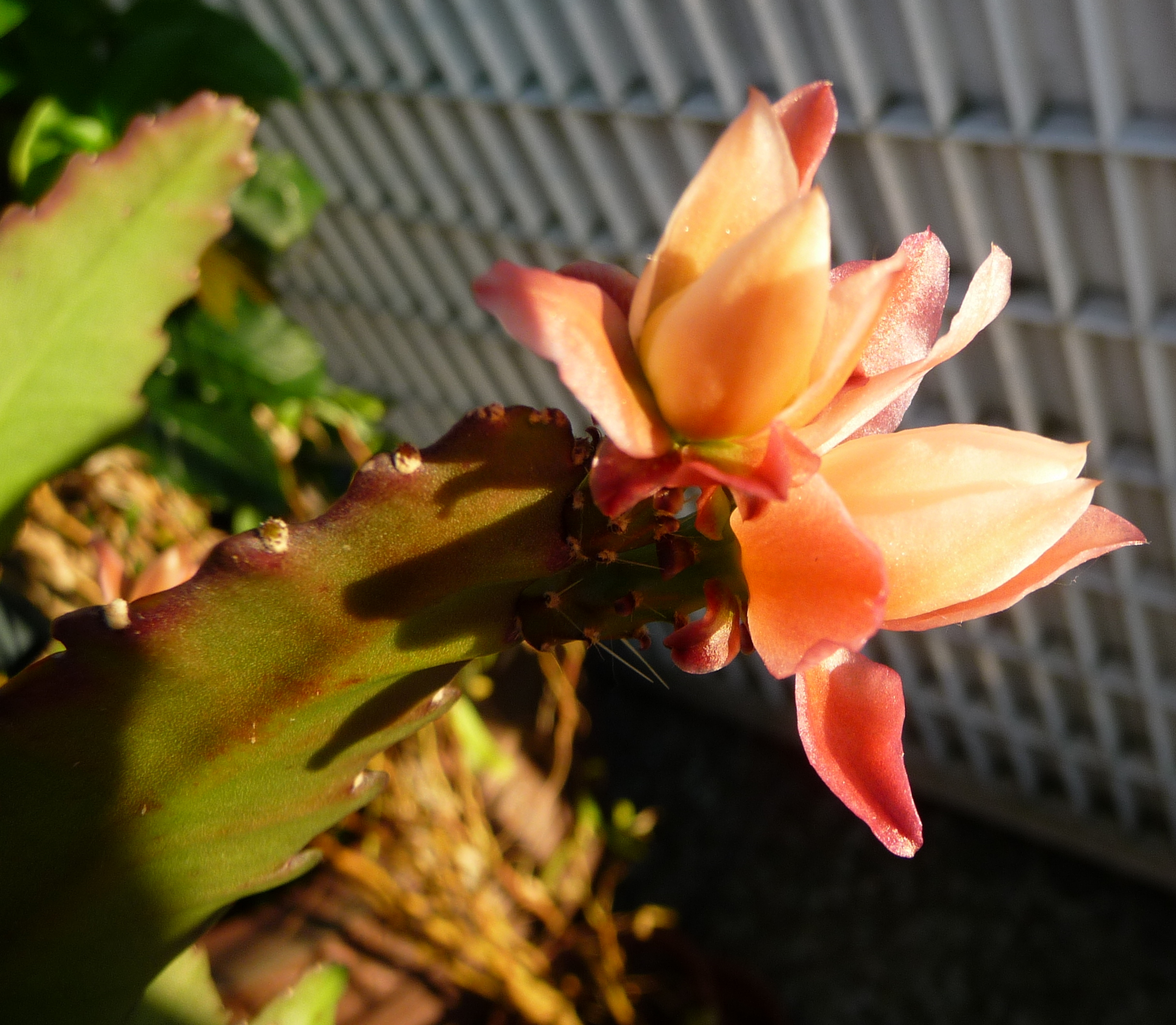 Jeunes fleurs non ouvertes de l'Impératrice allemande (Disocactus phyllanthoides) . Lumière de fin de journée.